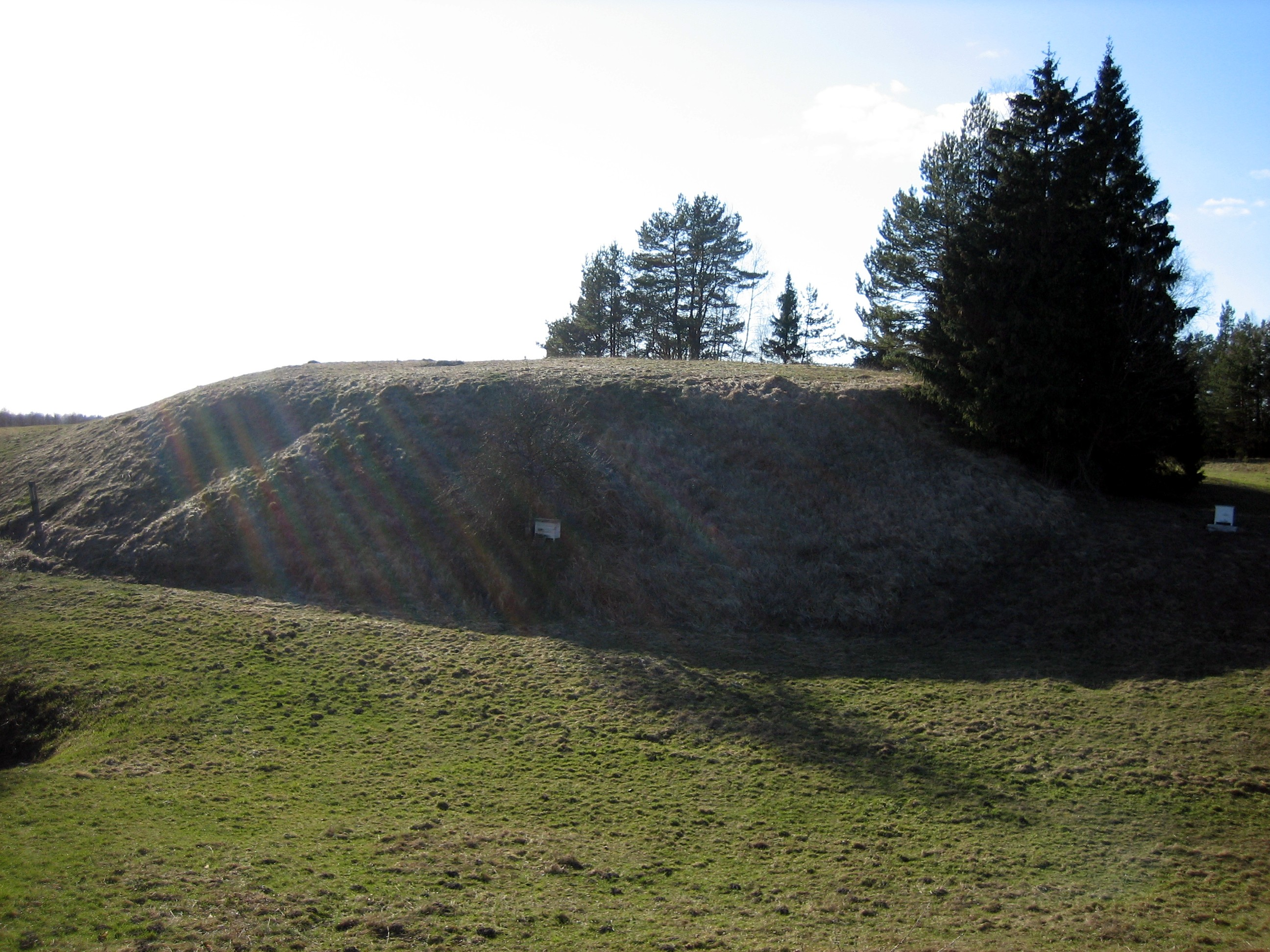 Vorėnų piliakalnis